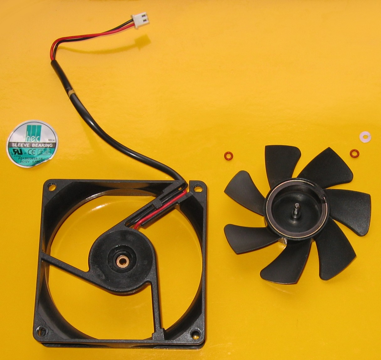 80-mm-Lüfter mit Gleitlager